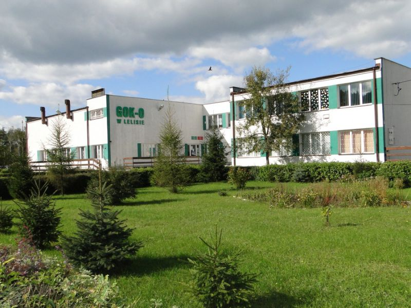 Lelis, GOK